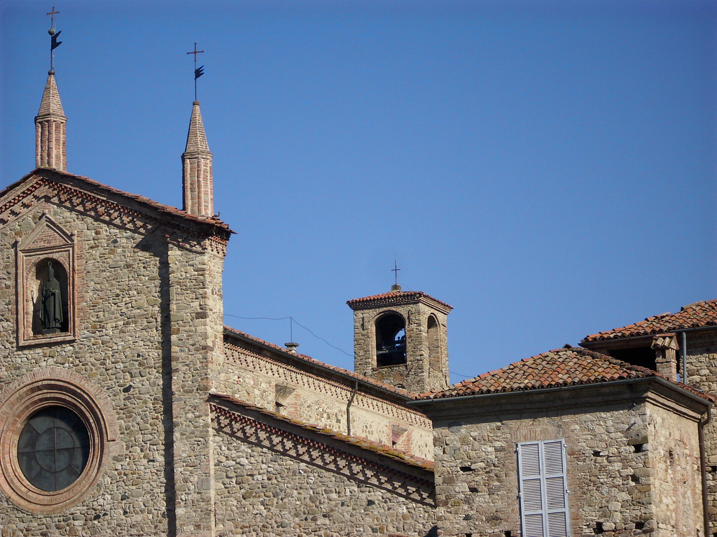 Abbazia di San Colombano, Bobbio